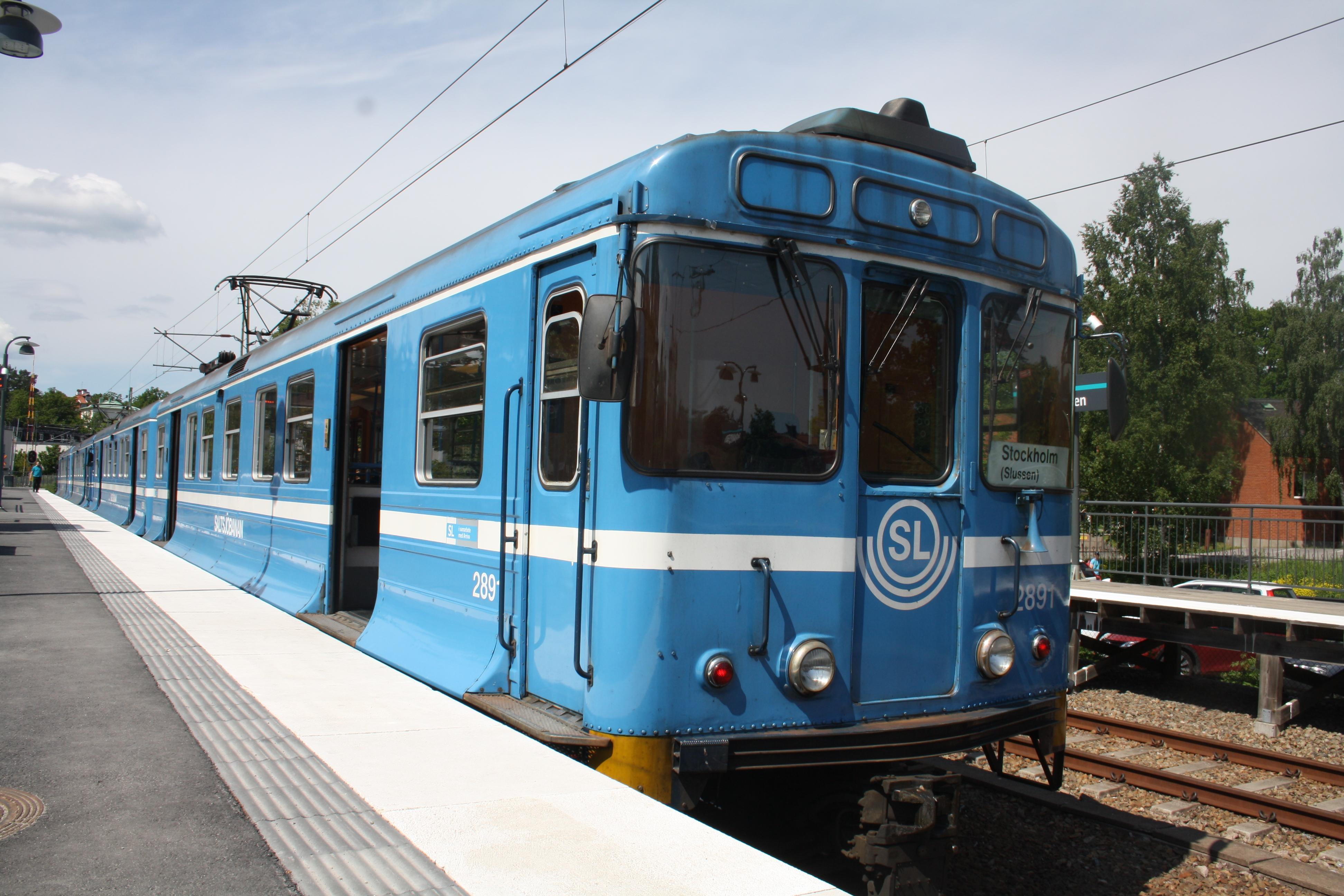 Saltsjöbaden